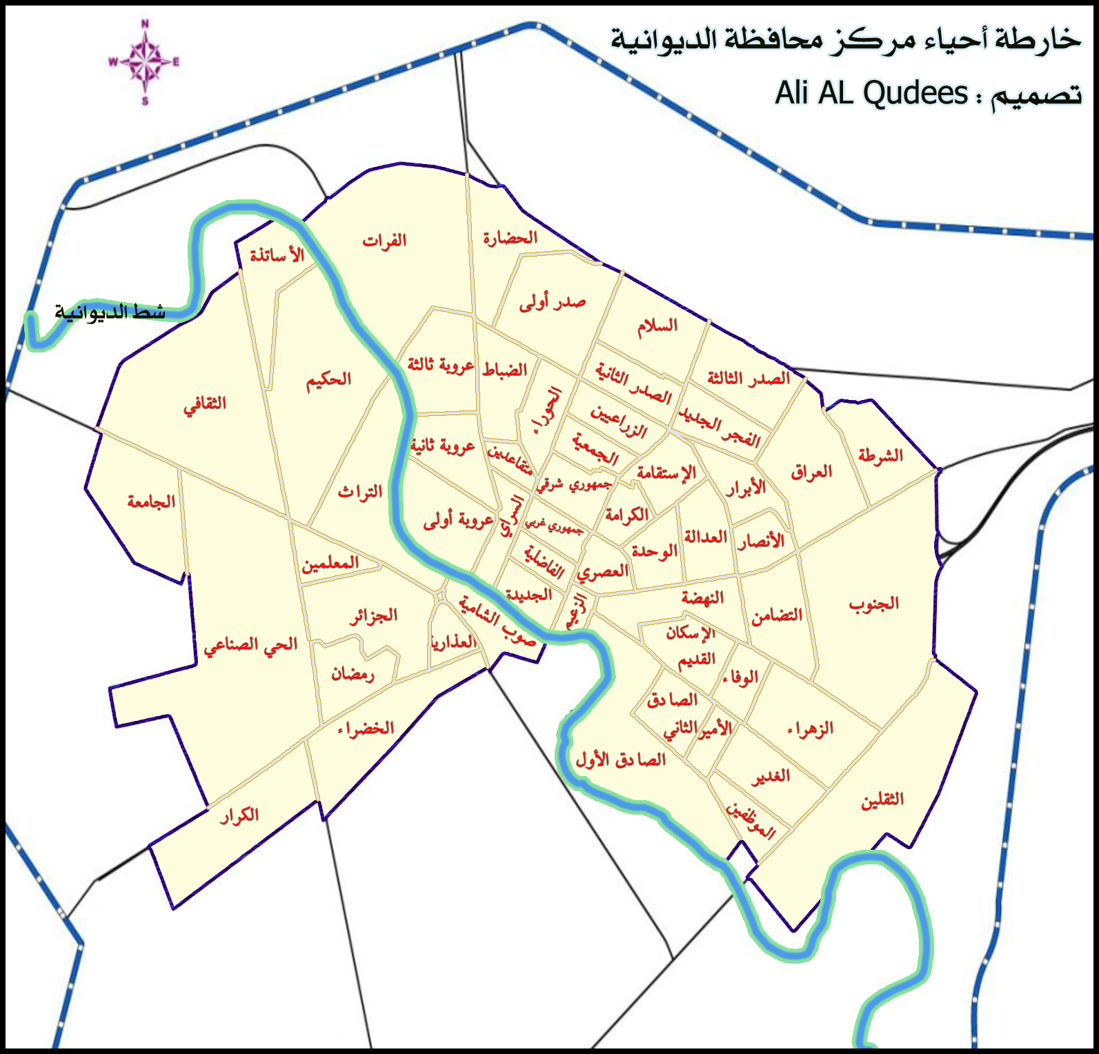 خارطة مفصلة لأحياء مركز محافظة الديوانية